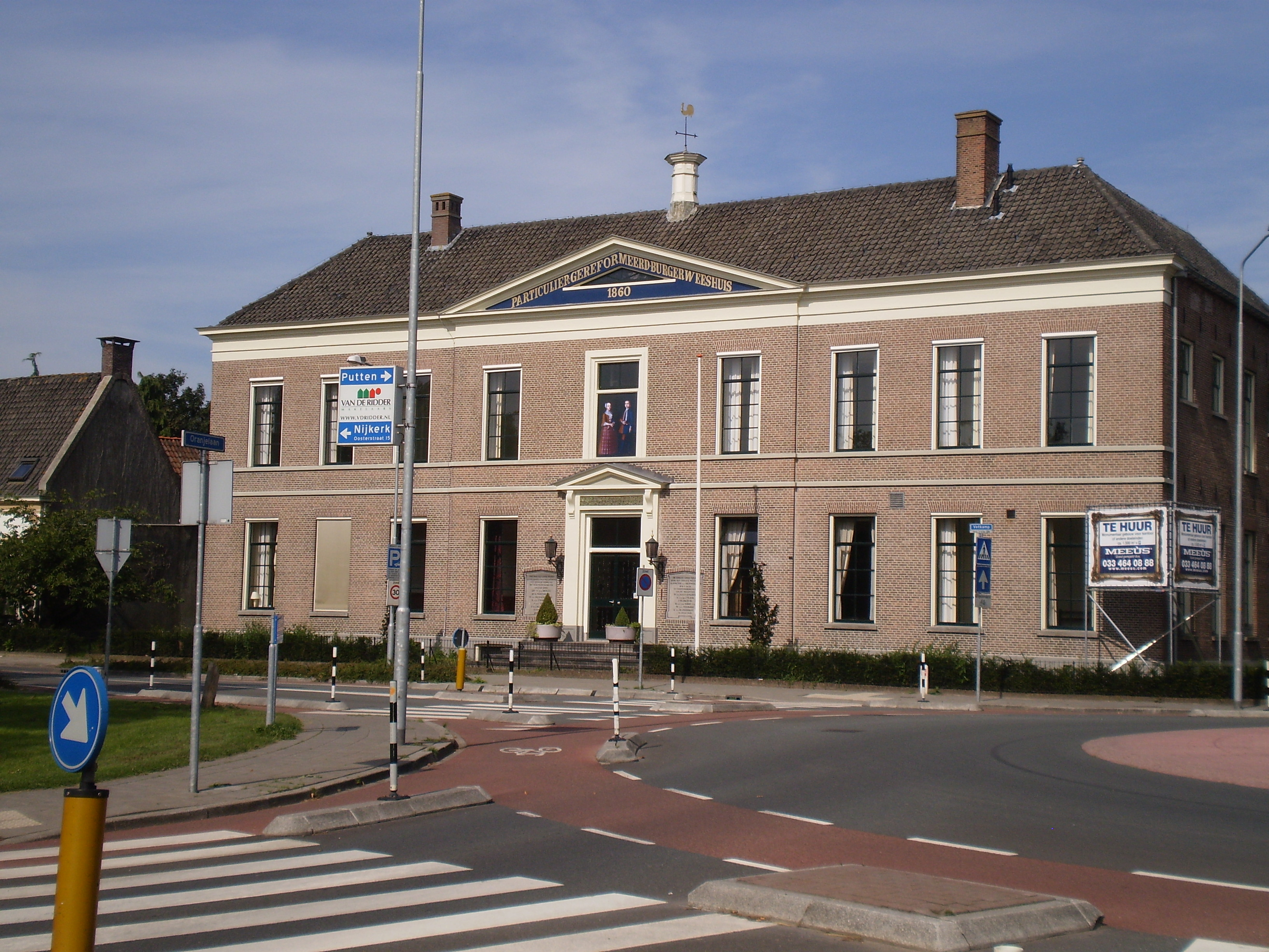 Partikulier grifformeard Boargerweeshûs Nijkerk. Ofbyld oanbean troch Swarte Kees op 16 augustus 2009